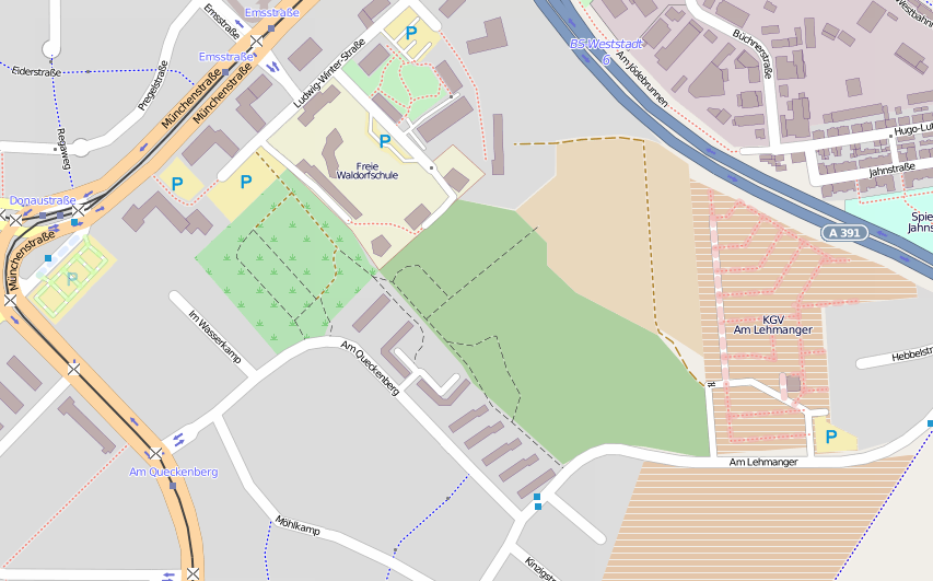 Plan der Brachfläche (der zukünftigen Parkanlage Münchenstraße) zwischen Münchenstraße und Am Lehmanger in Braunschweig-Weststadt.